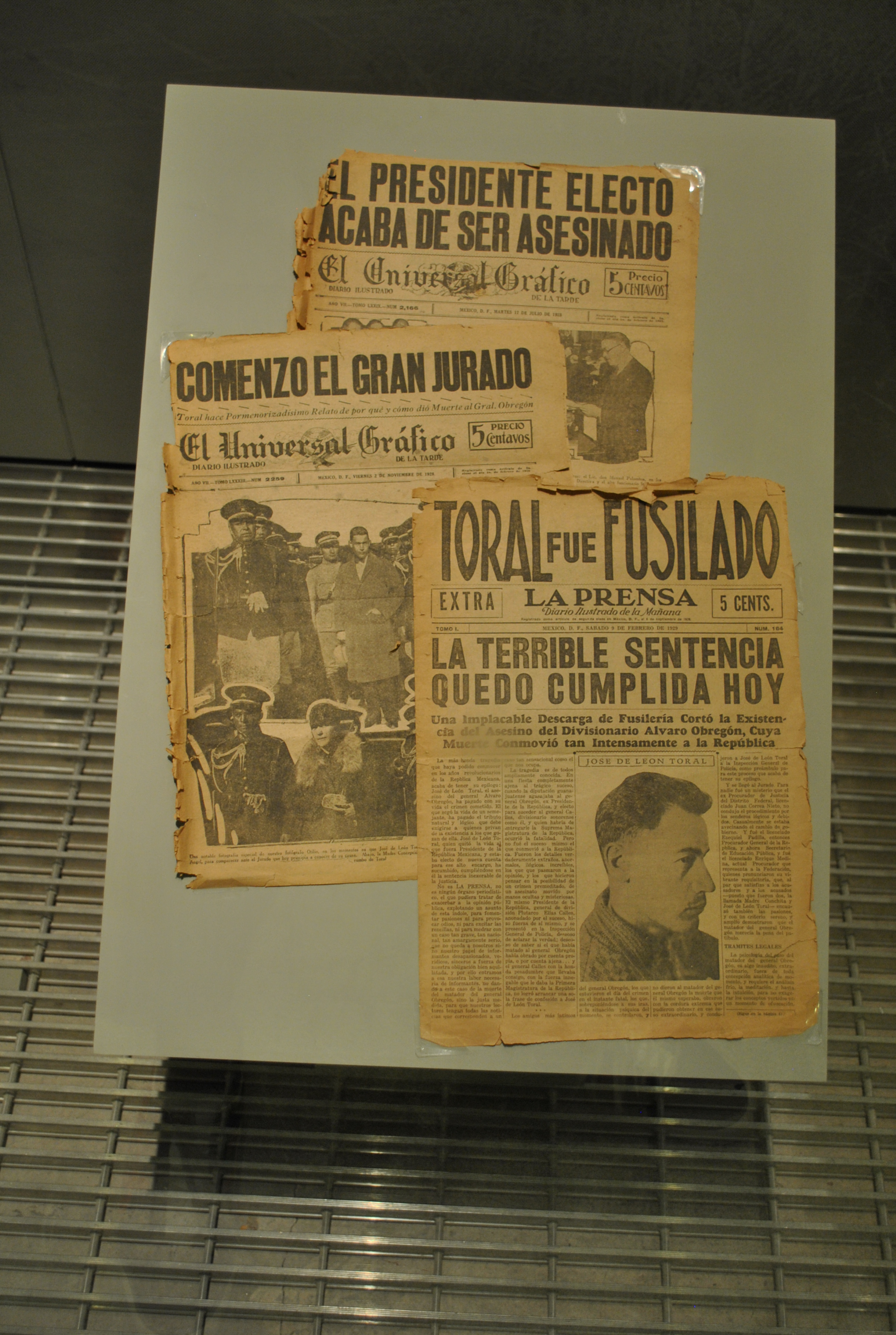 Periodicos del siguiente día del asesinato de Obregón.